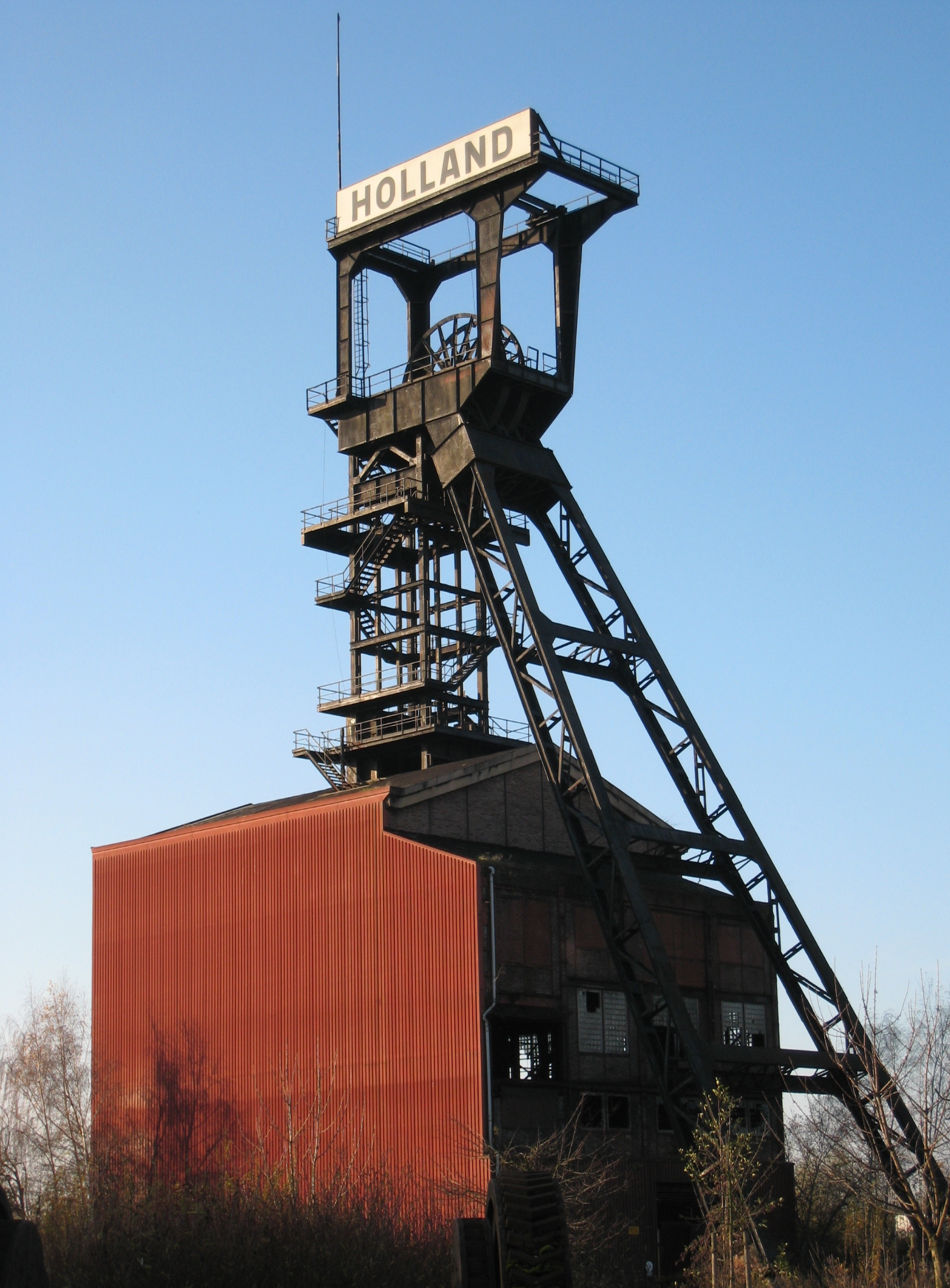 Foerdergerüst Zeche Holland Wattenscheid, Schacht 4